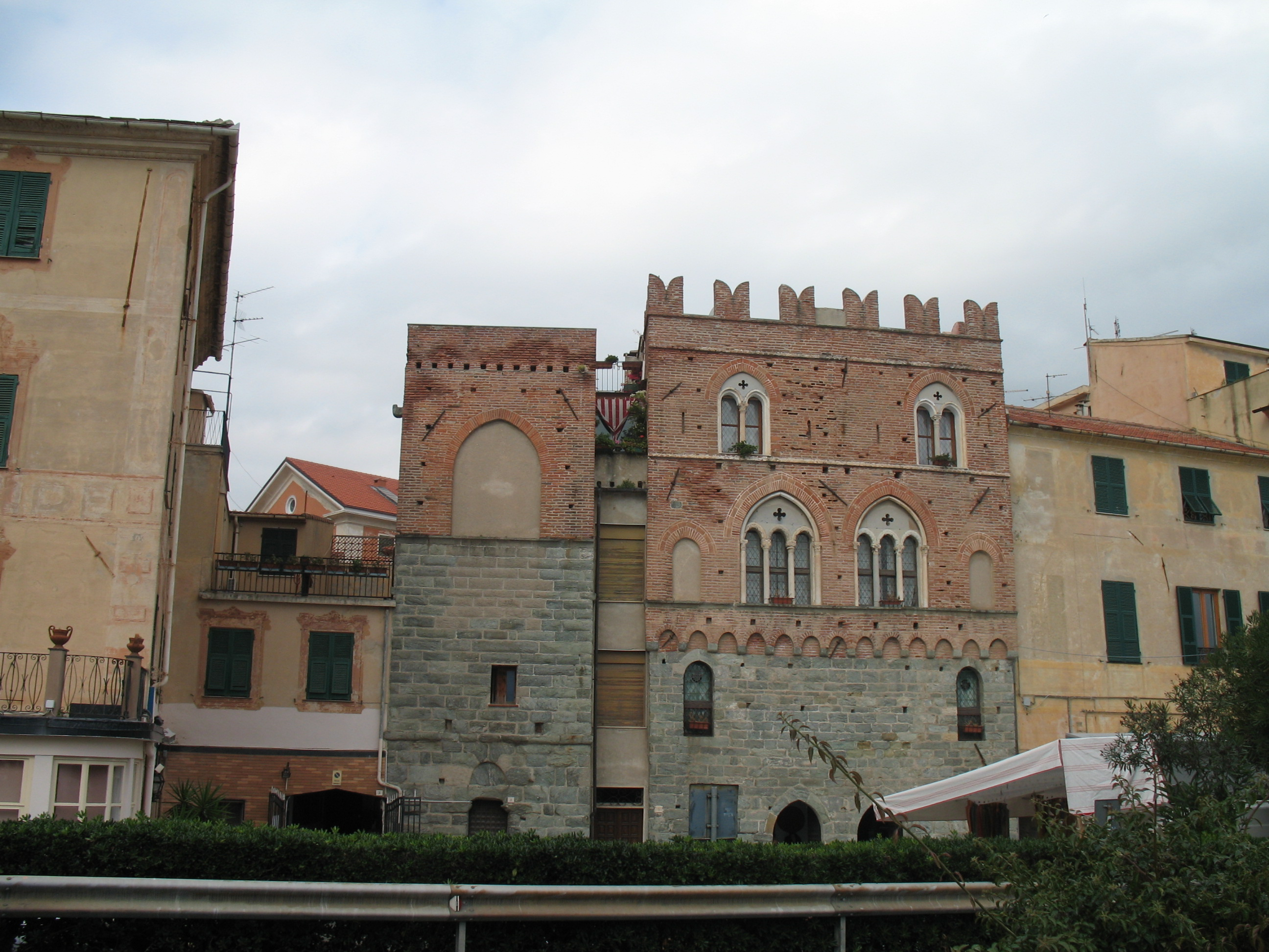 Serie di Immagini da Noli in provincia di Savona